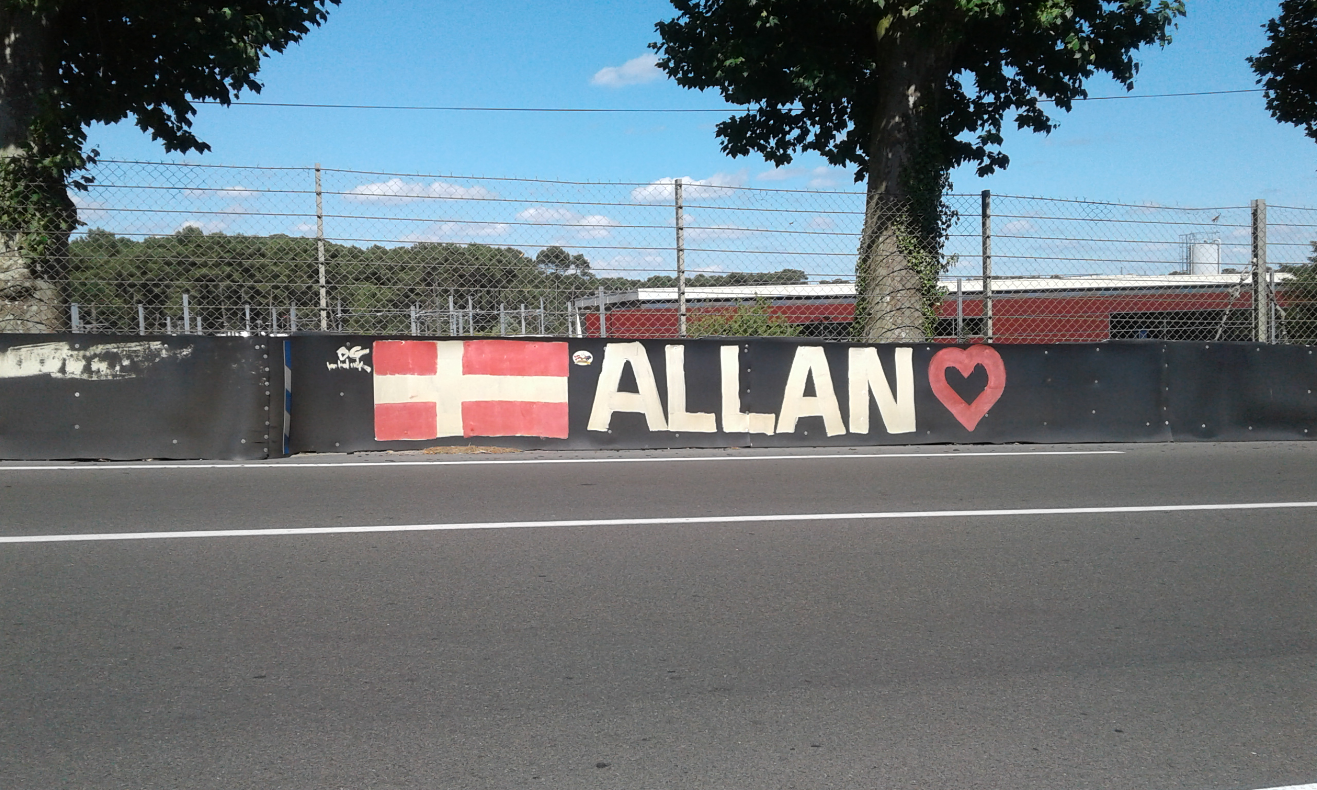 oeuvre commémorative Allan Simonsen sur le circuit du Mans